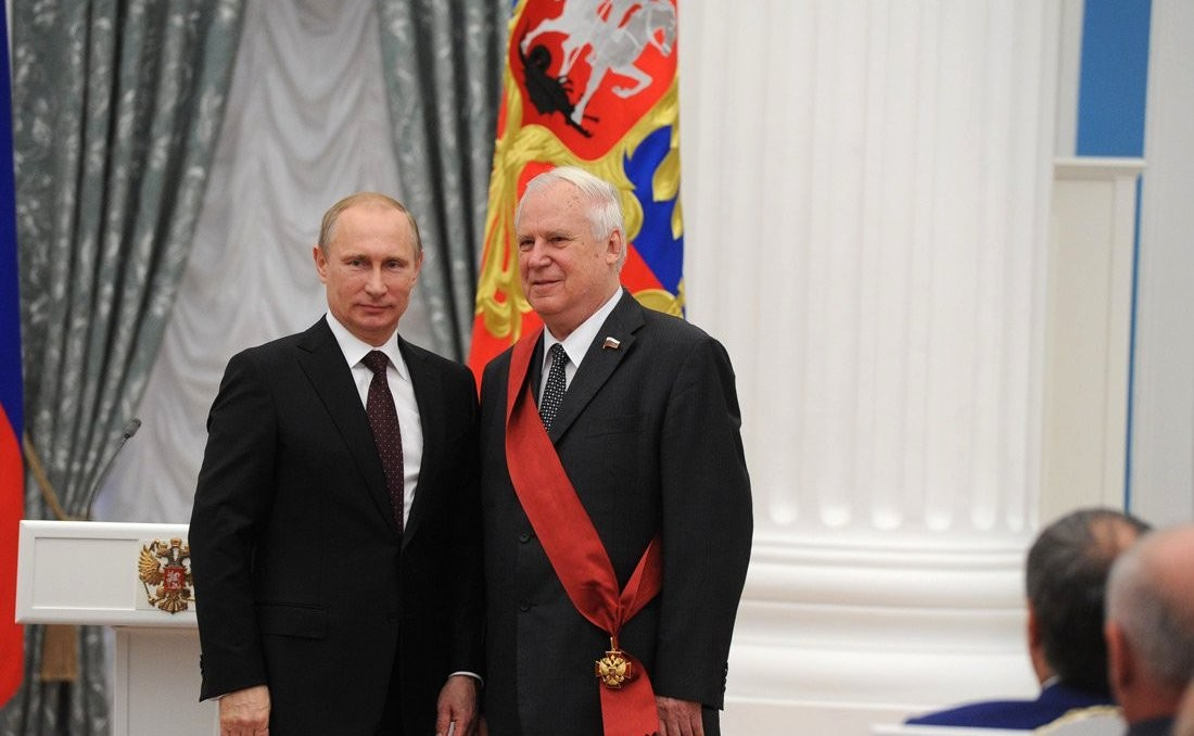 Орденом «За заслуги перед Отечеством» I степени награждён член Совета Федерации Николай Рыжков